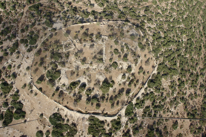 Qeiyafa city wall